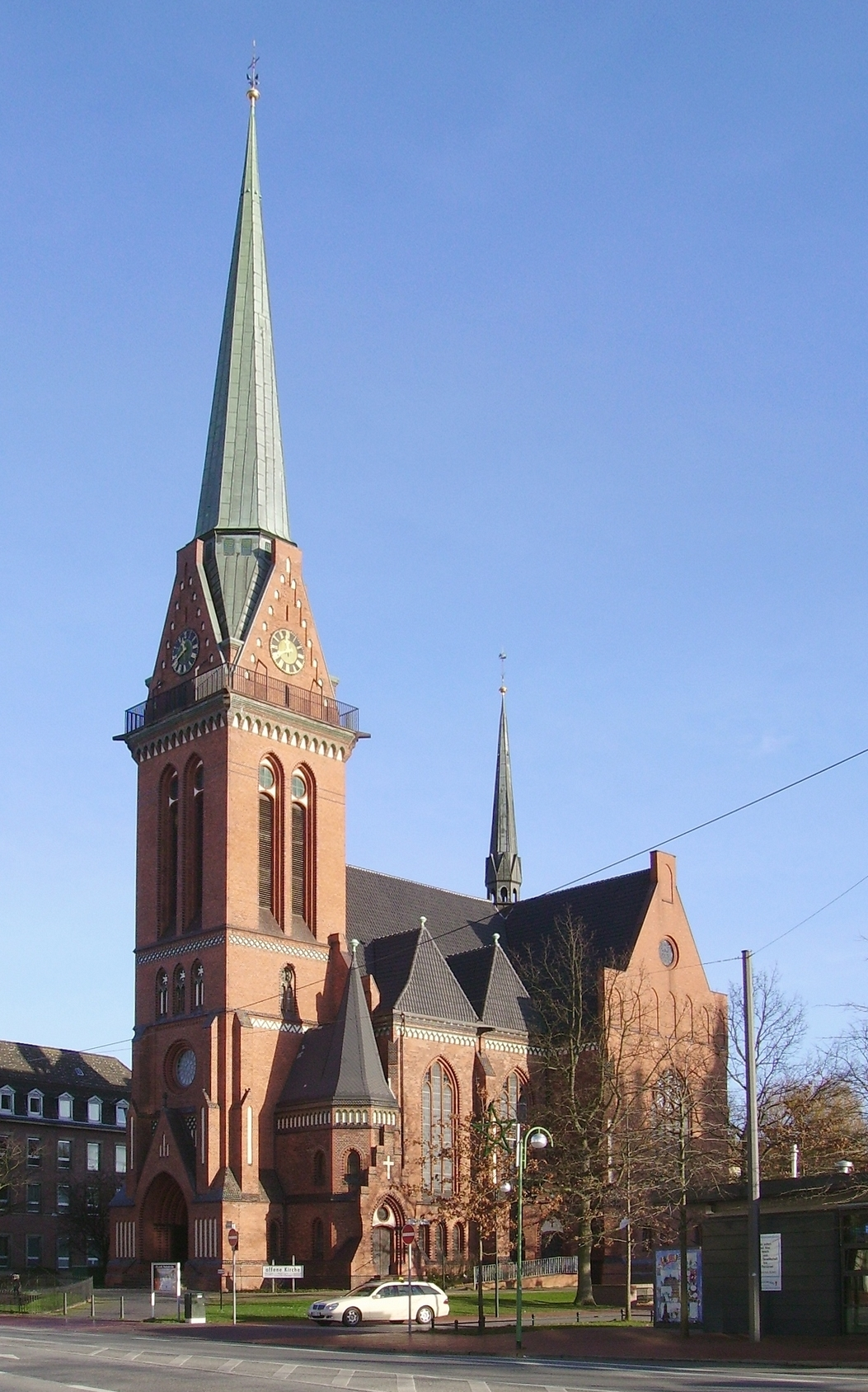 Die 1905 erbaute evangelisch-lutherische Pauluskirche im Stadtteil Lehe von Bremerhaven gehört und dient der Evangelisch-lutherischen Michaelis- und Pauluskirchengemeinde in der Evangelisch-Lutherischen Landeskirche Hannovers. Das abgebildete Objekt ist ein geschütztes Kulturdenkmal in der Freien Hansestadt Bremen, mit der Nr. 1570 beim Landesamt für Denkmalpflege registriert.